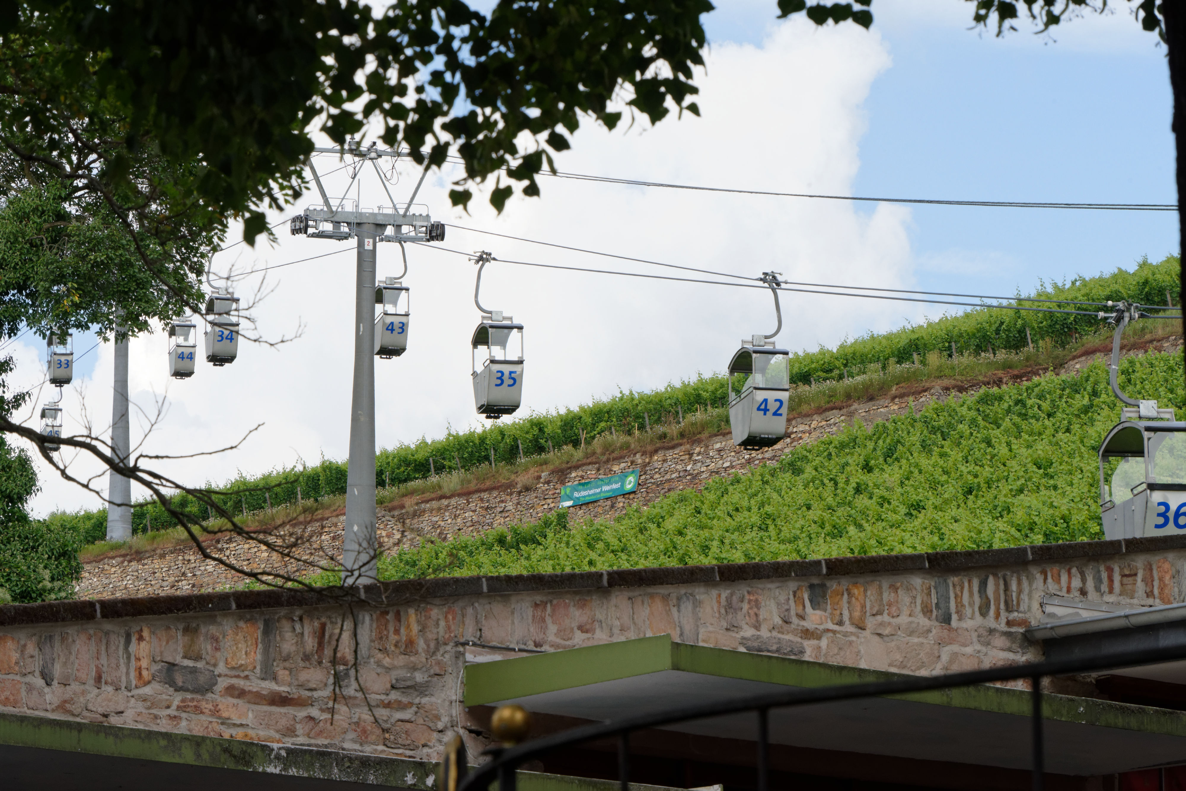 Rüdesheim Seilbahn zum Niederrheindenkmal